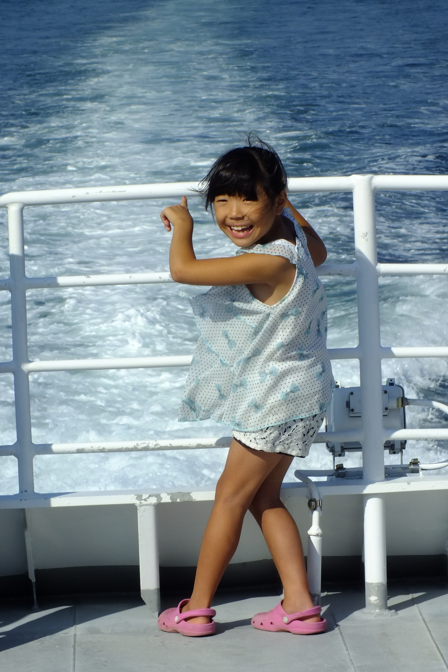 2016-08-05 Kagayaki (ship, 2009)Port of Toba 鳥羽市営定期船「かがやき」